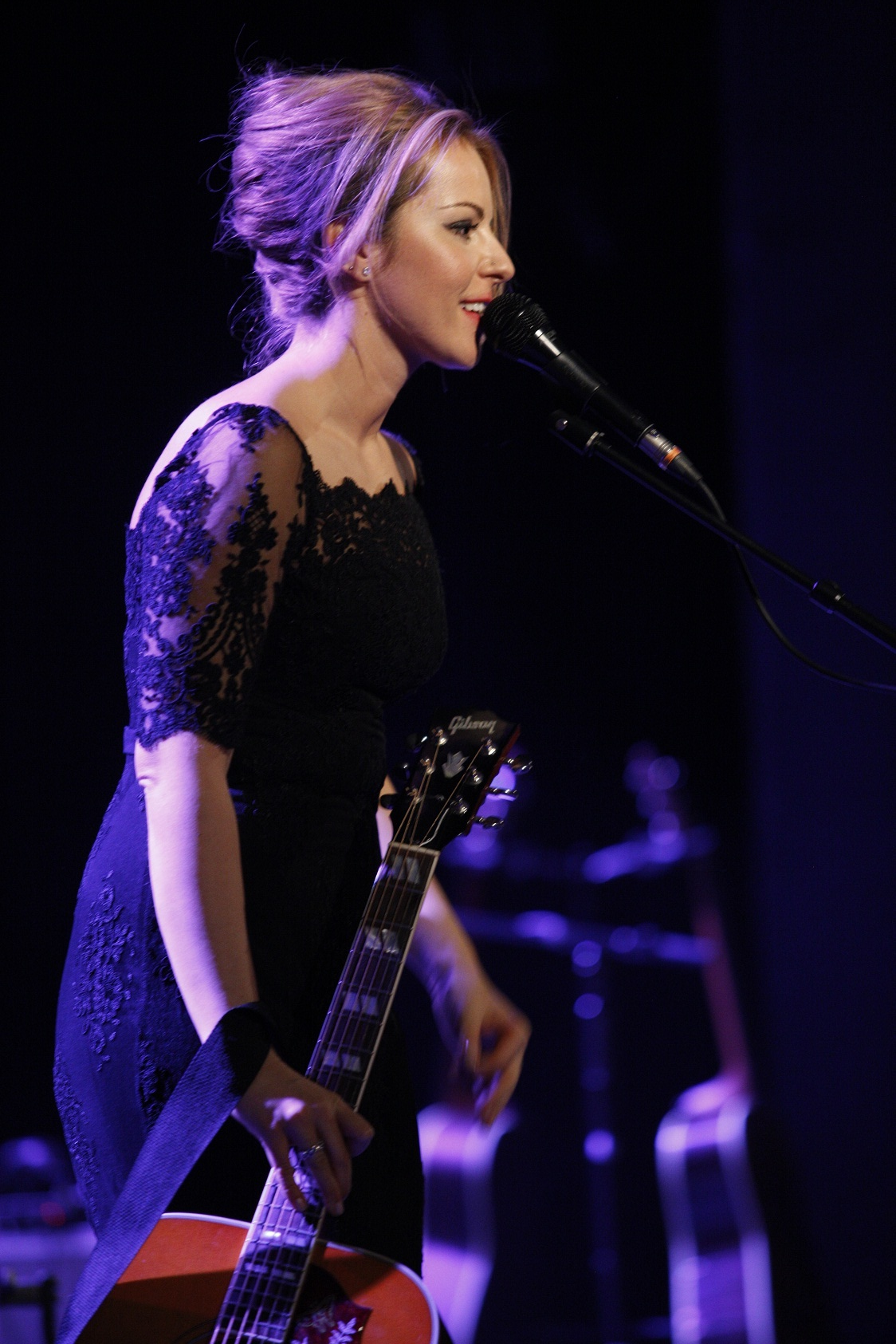 Tour s Davidom Kollerom v ČR 2013